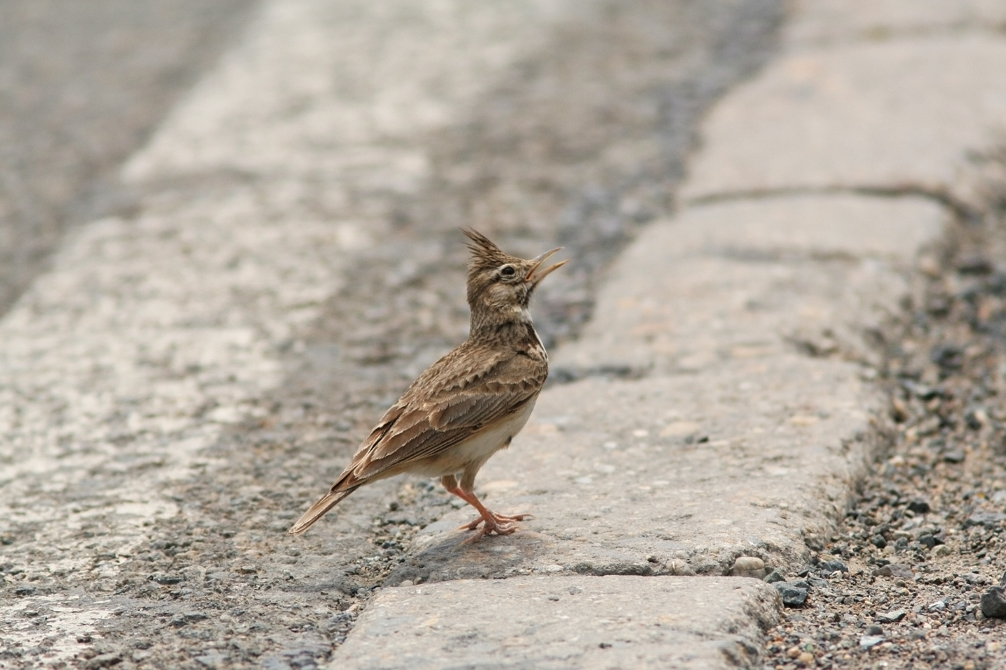 Galerida cristata, Romania 2007